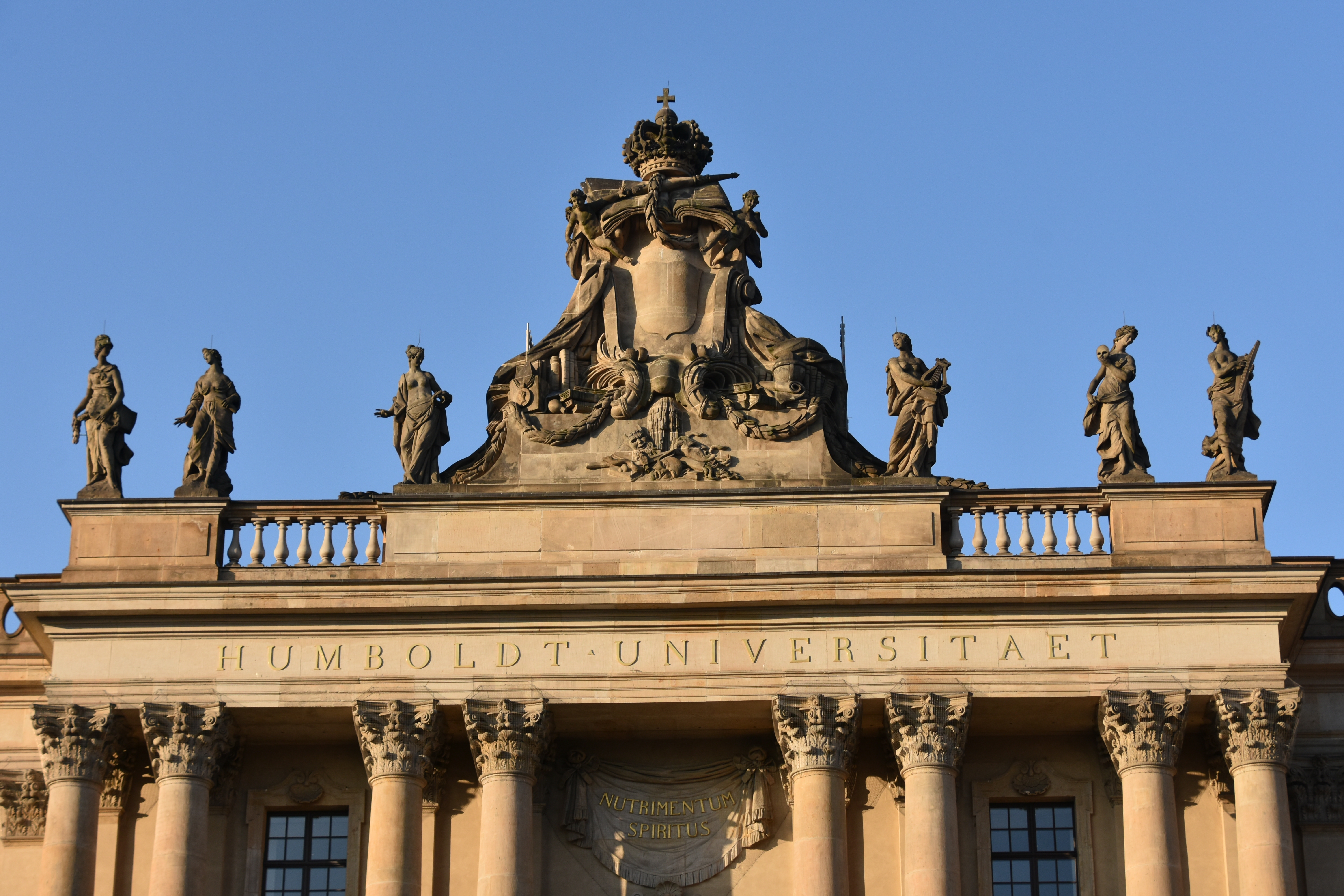 Alte Bibliothek, Unter den Linden, Berlin, 1775 (11)